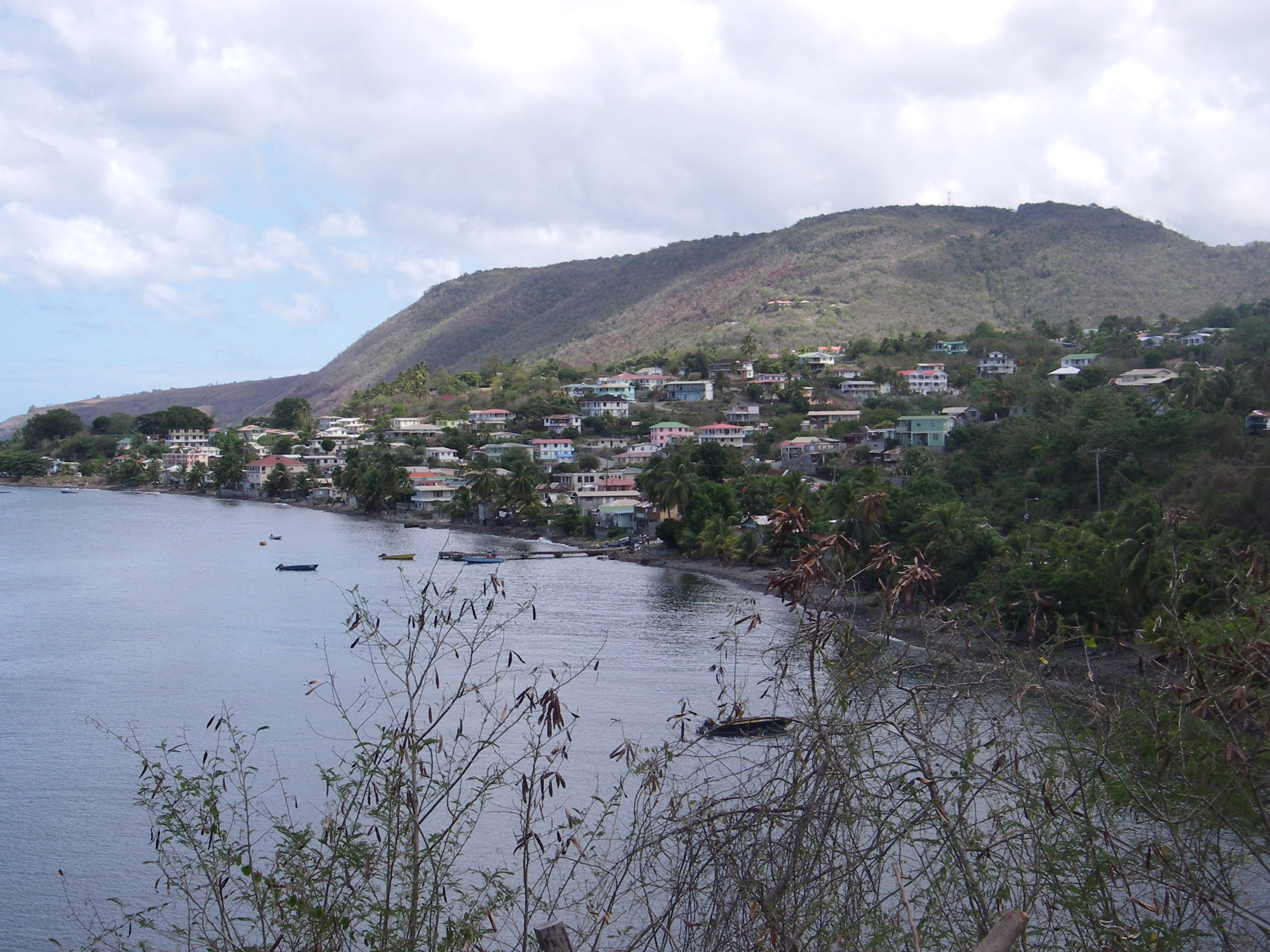 Mahaut